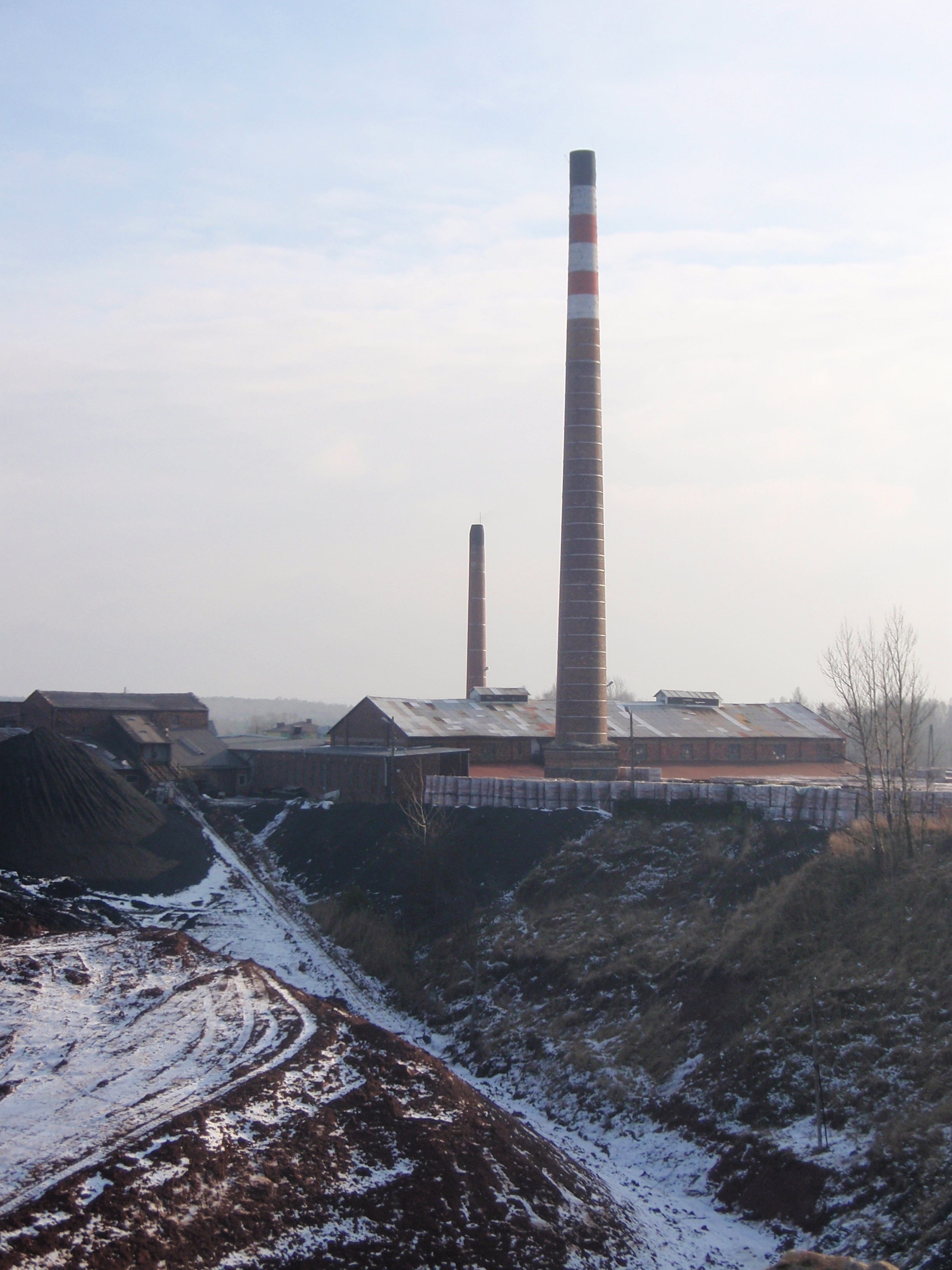 Cegielnia w Sławkowie (woj. śląskie)